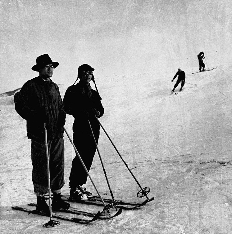 촬영일 : 1954년 02월 14일 촬영장소 : 대한민국 강원도 대관령 참석자 : 미상 관련내용 : 대관령 스키대회 참관자들의 모습.